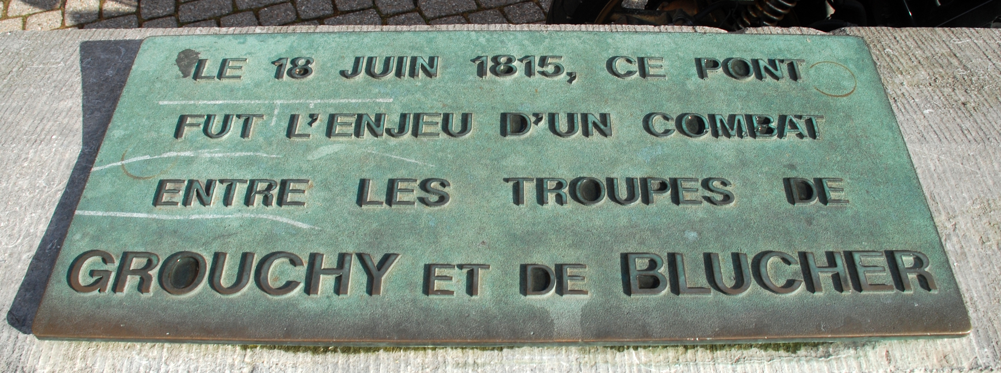 Belgique - Brabant wallon - Wavre - Pont du Christ (bataille de Wavre, 18 juin 1815)